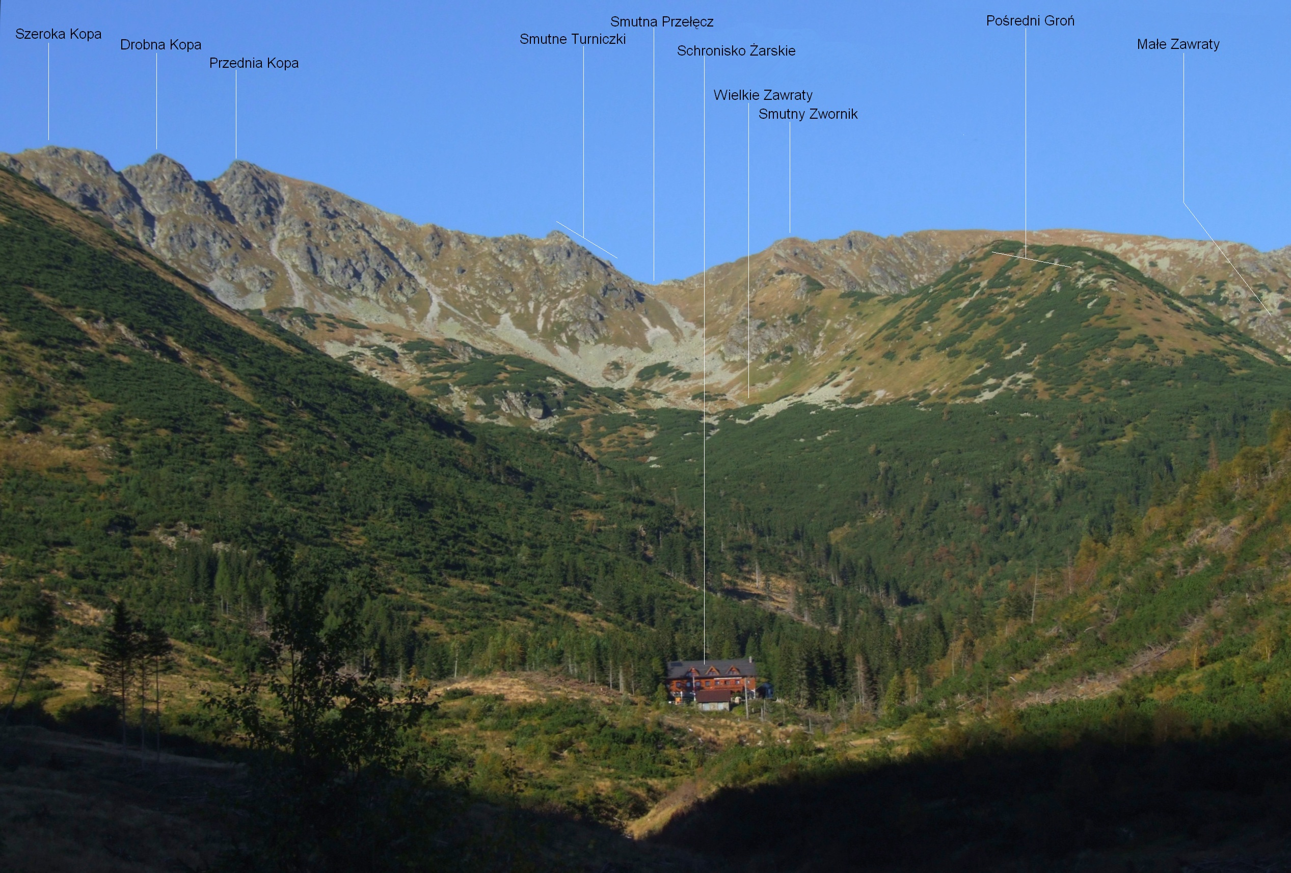 Widok z Doliny Żarskiej